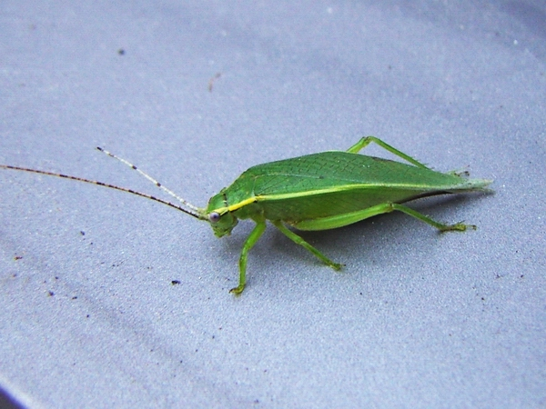 Calyptotrypus hibinonis = Truljalia hibinonis, female, Nagasaki